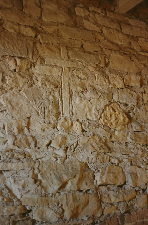 interior cross